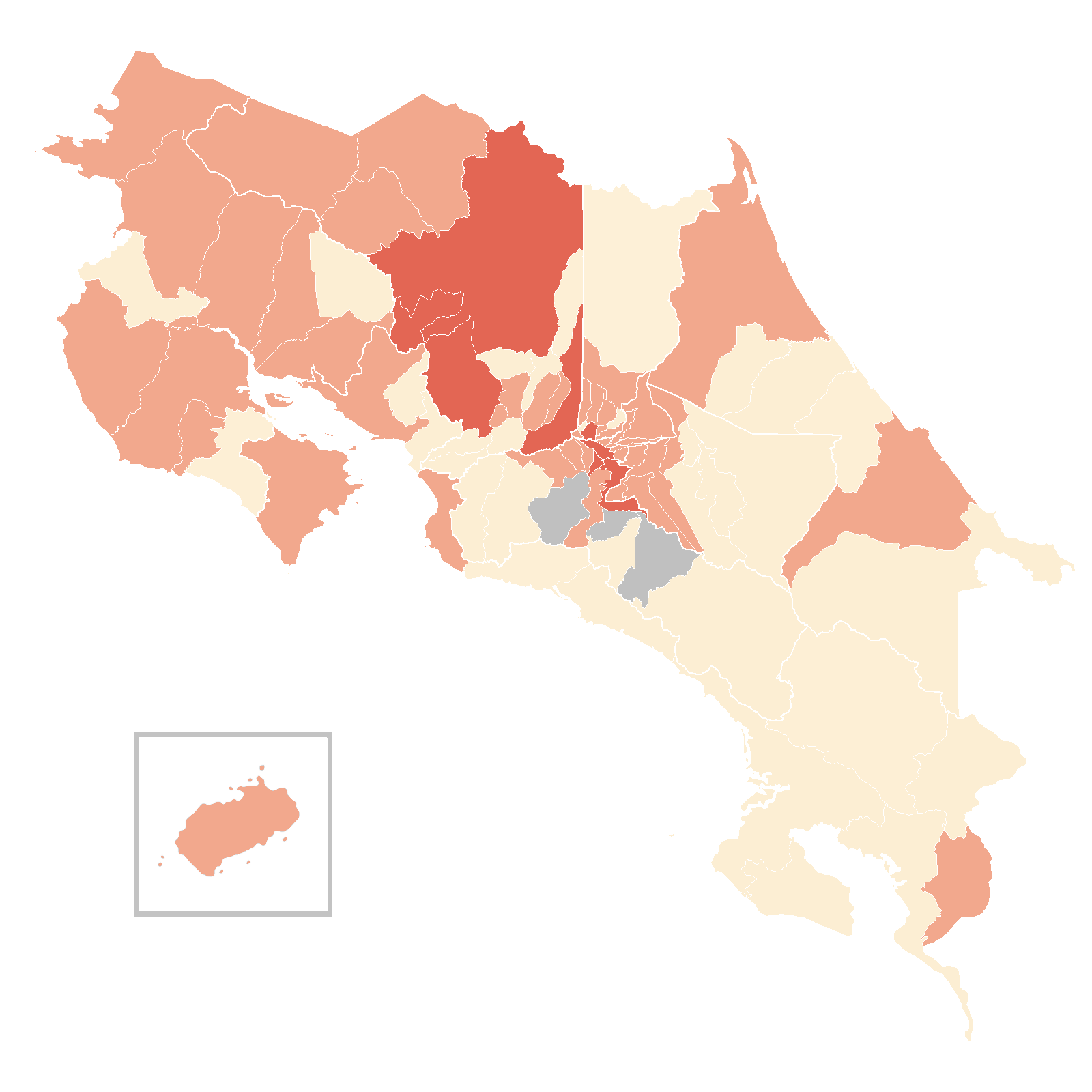 Map of Costa Rican cantons with confirmed coronavirus cases Confirmed 1~9 Confirmed 10~99 Confirmed 100+